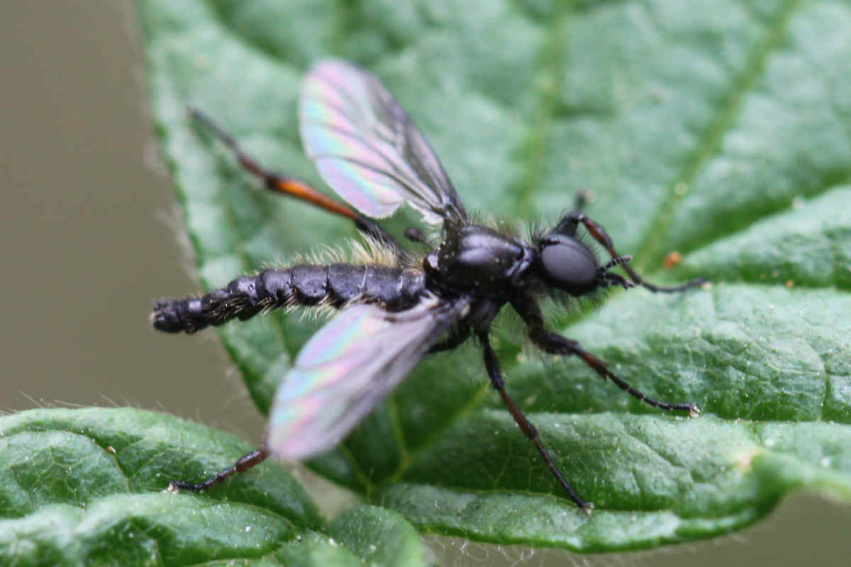 Johannis-Haarmücke (Bibio johannis), Männchen, am 14.4.2017 in der Schwetzinger Hardt